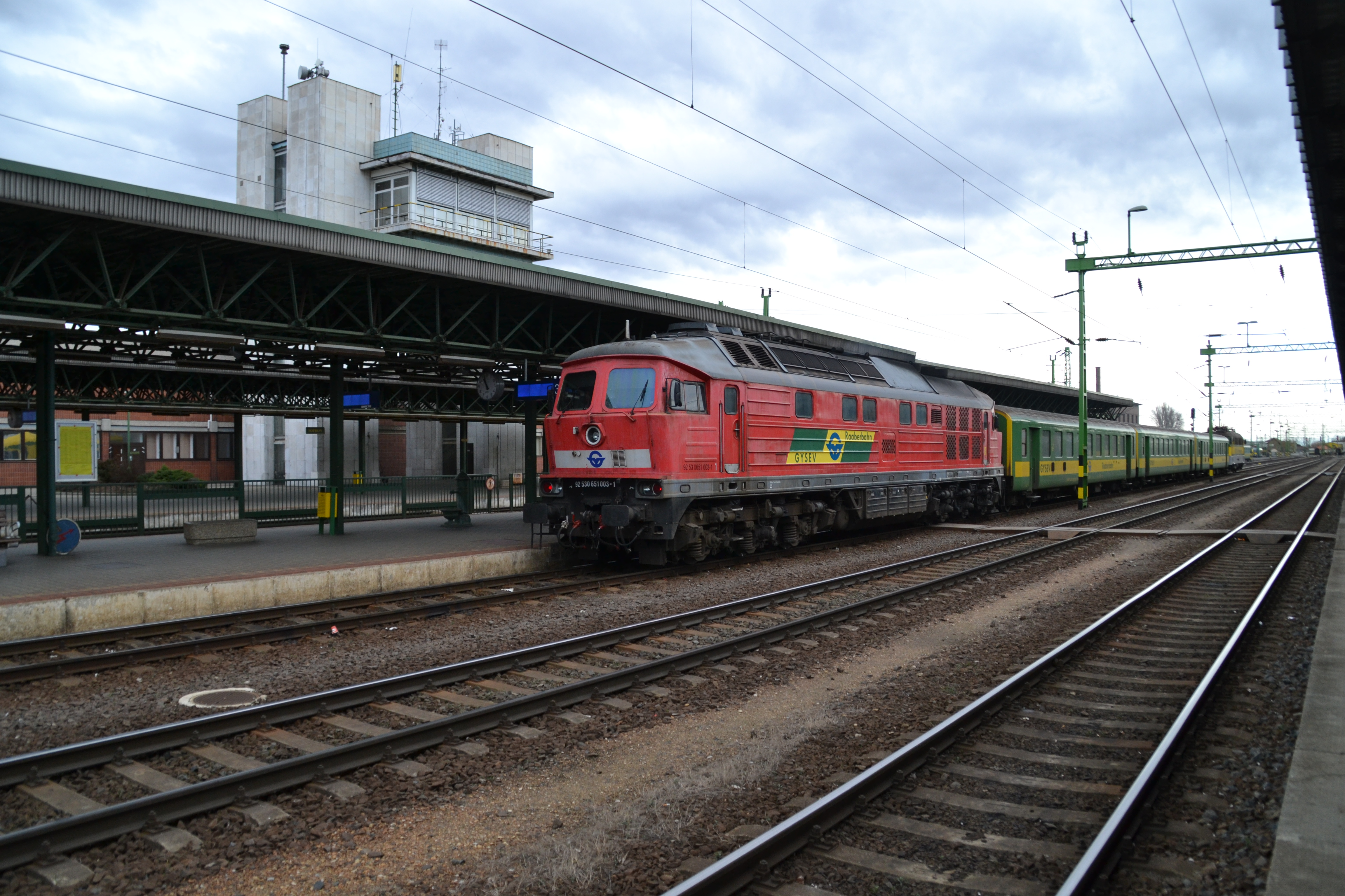 Ludmilla Sopron állomáson